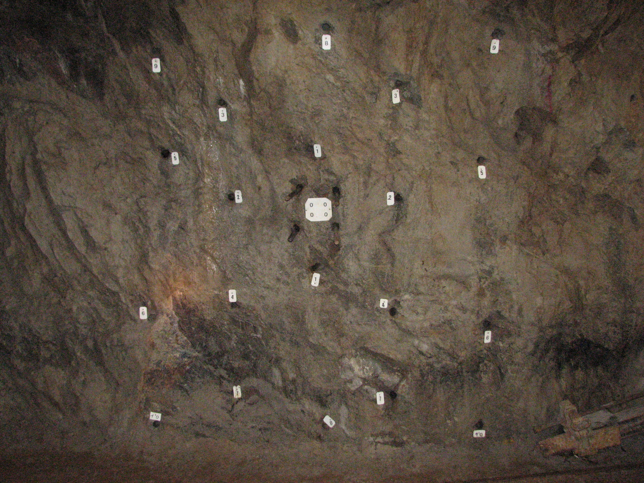 Schematische Darstellung einer Schußfolge mit brisanten Sprengstoffen aus dem Bergwerk Finstergrund bei Wieden; Schießen aus dem Vollen. Die Tafeln geben die Verzögerung der Sprengzünder in Millisekunden an; Schußfolge durch Millisekundenzünder (Millisekundenverzögerung). Datierung: Zwanzigstes (20.) Jahrhundert, vermutlich 1950-1960.